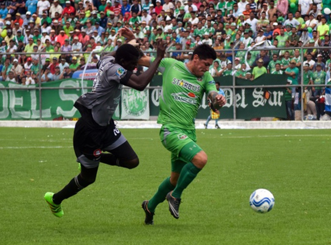 Paulo Centurión en el juego de la Final contra el Deportivo Carchá